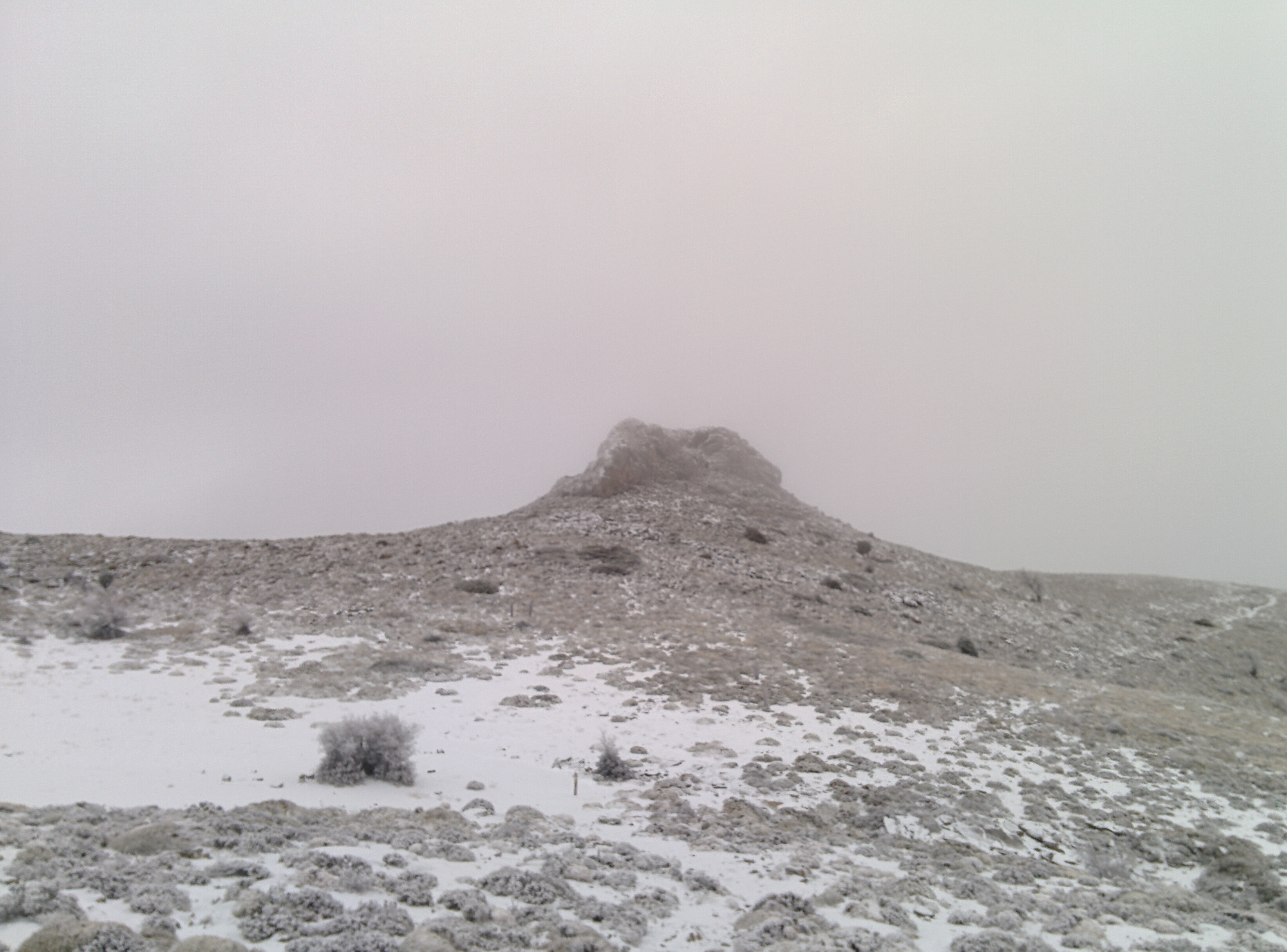 El Peñón de los Enamorados de la Sierra de las Nieves en una nevada ocurrida en Febrero de 2018.